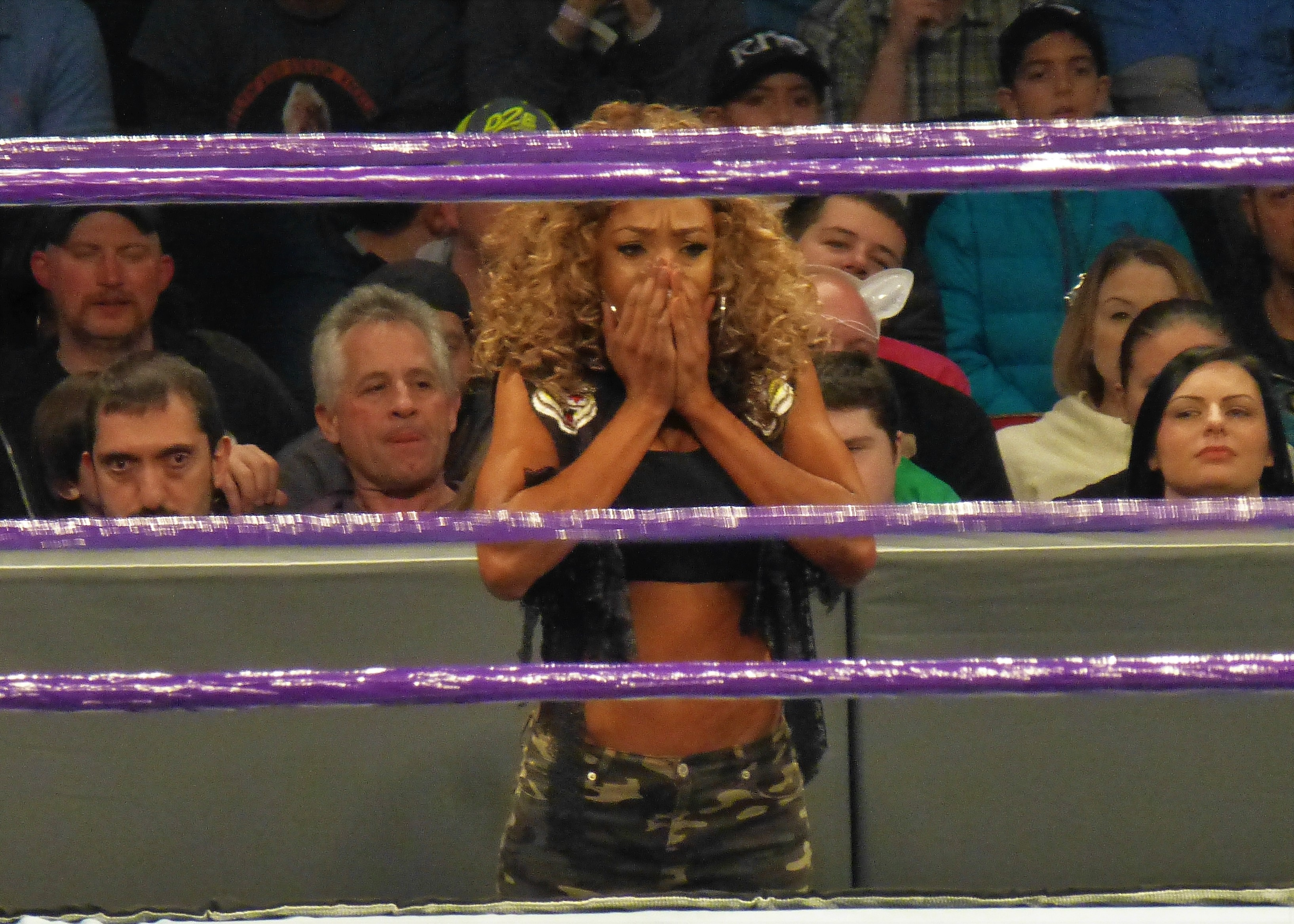 Alicia Fox